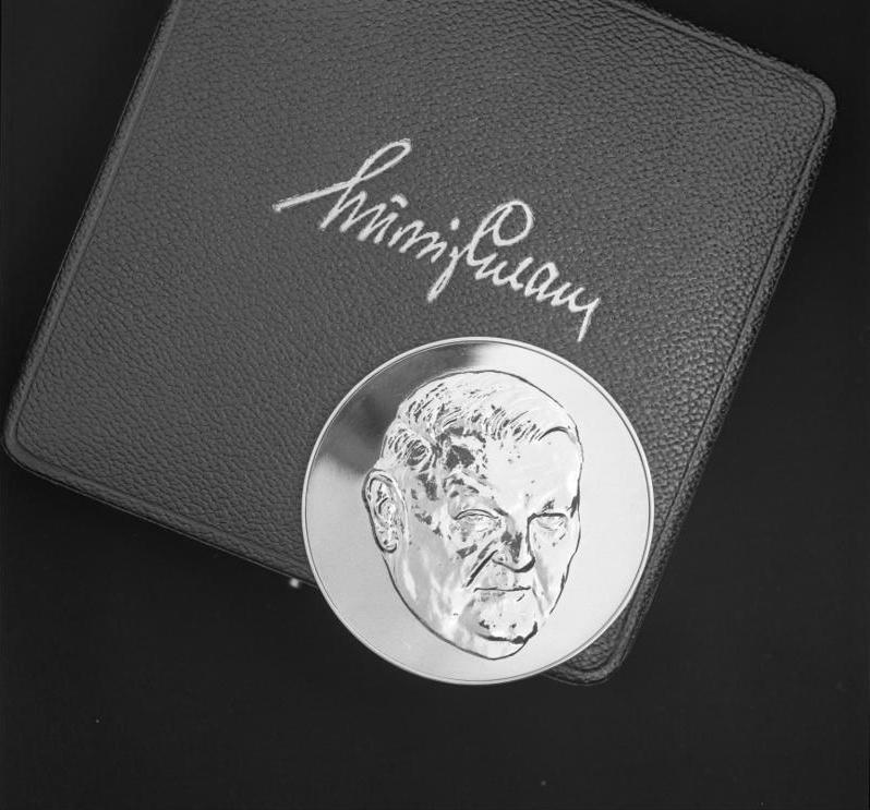 Die "Ludwig Erhard Medaillie" mit Verleihungsurkunde für Prof. Dr. Alfred Müller-Armack.